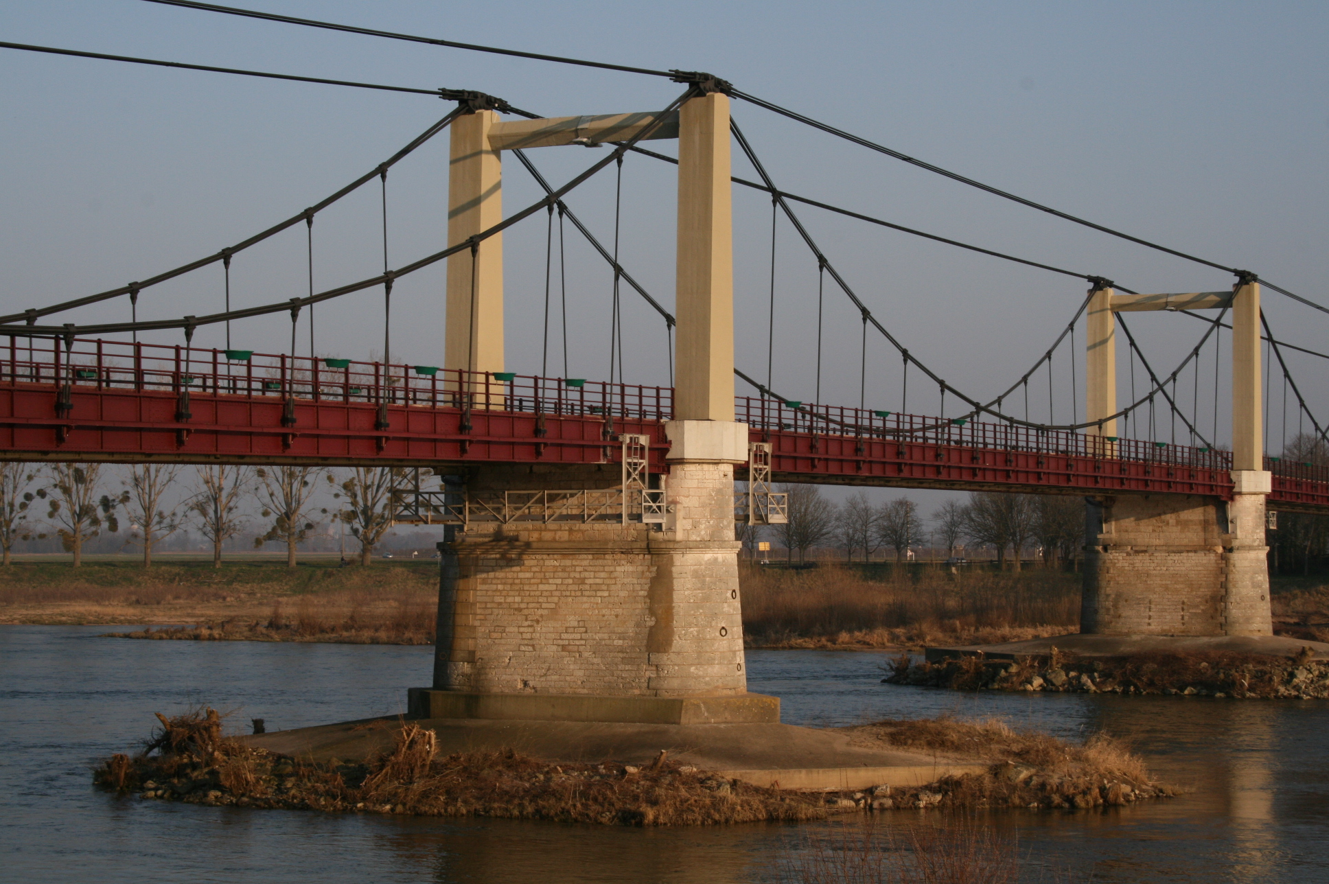 Pont de Meung-sur-Loire – Commune de Meung-sur-Loire – Département du Loiret – France – Pont suspendu